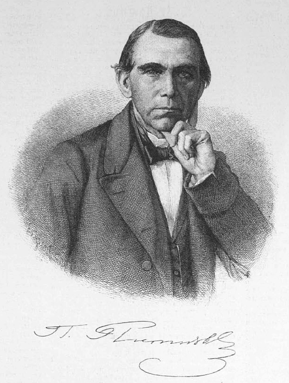 Плетнёв Пётр Александрович.